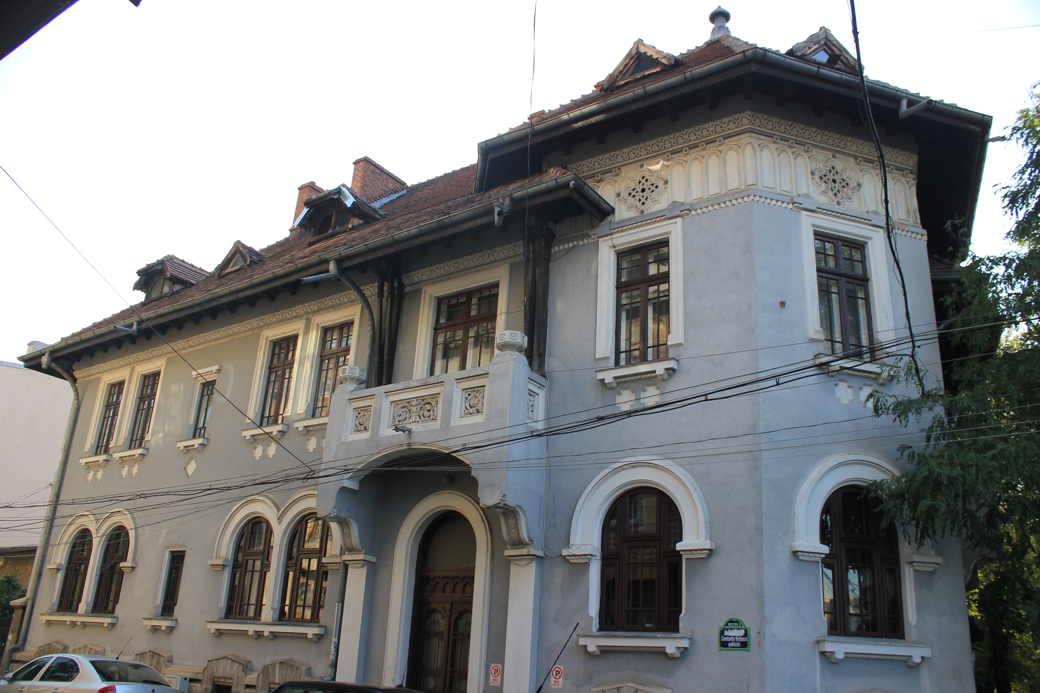 Casă Kiritescu Constantin 11 & Popa Soare 60bis